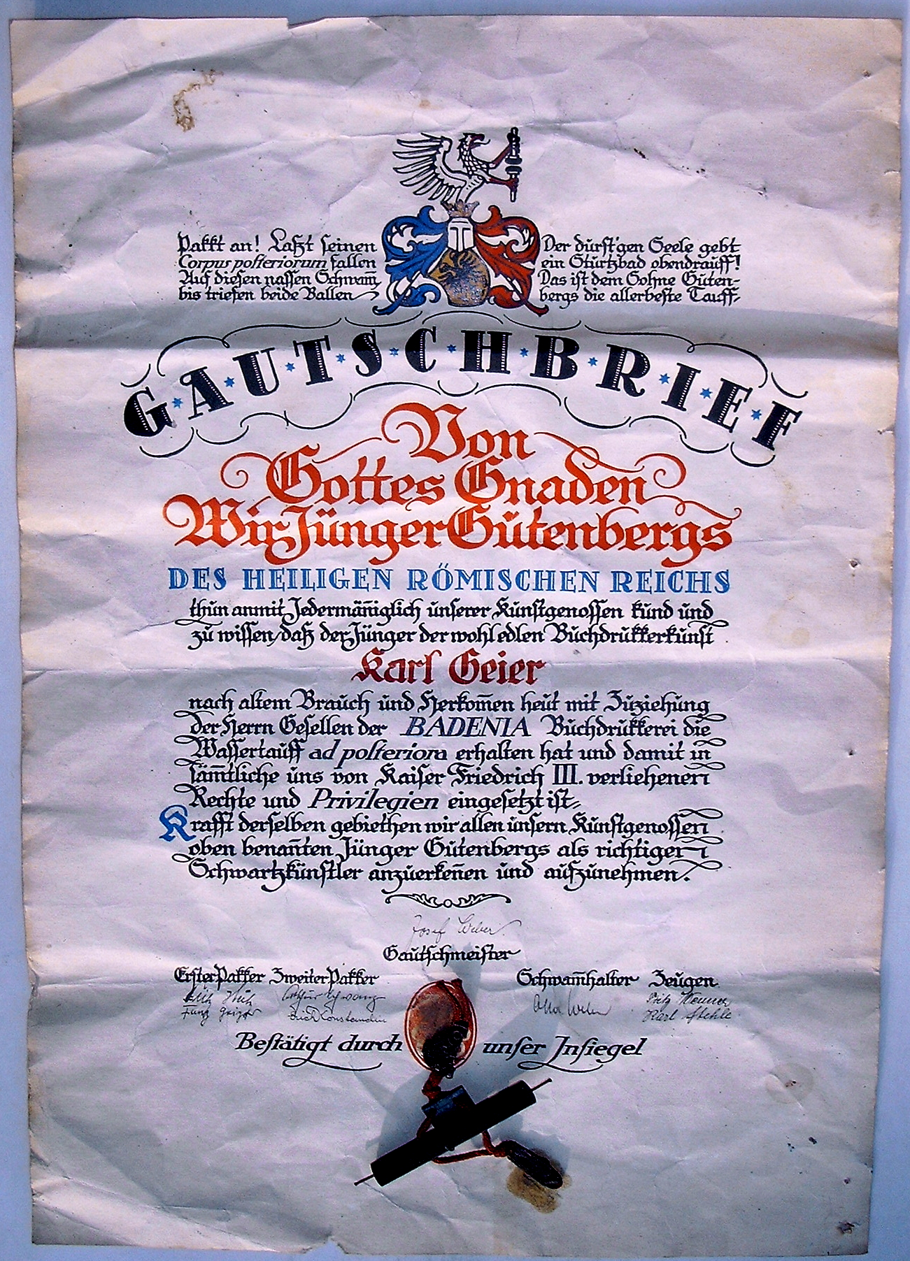 Gautschbrief/Urkunde